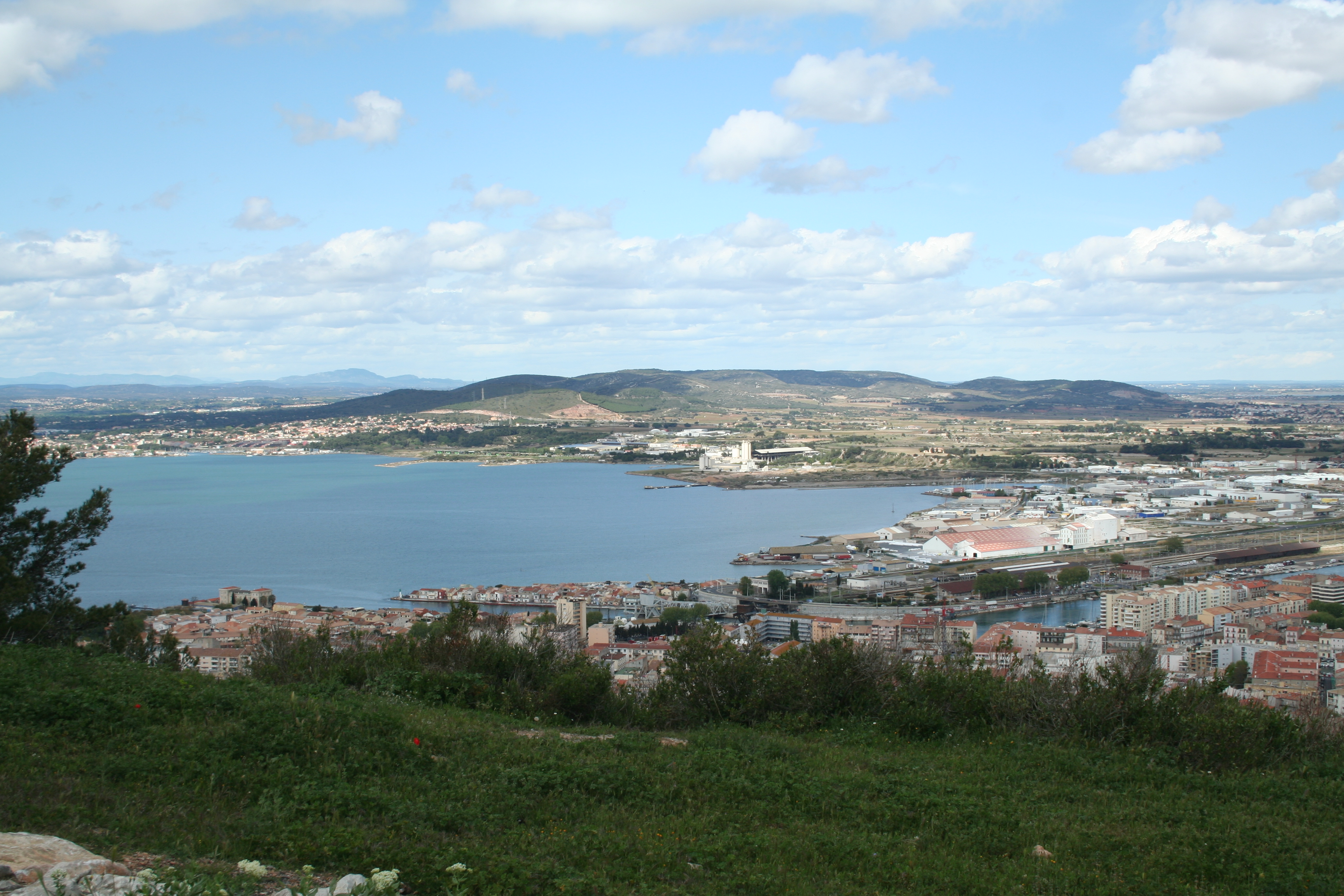 Sète (Hérault) - Vue depuis Saint-Clair sur l'étang de Thau, la Pointe Courte, les collines de la Gardiole. Au fond le Pic Saint-Loup.